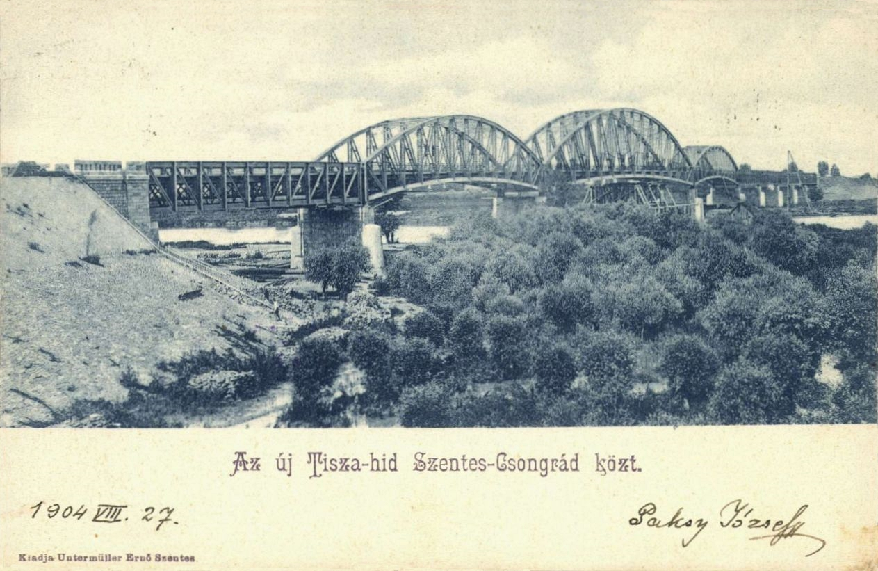 Az új Tisza-híd Szentes és Csongrád között 1903-ban, a megépülése évében, Untermüller Ernő (1870 k.–1942) kiadása